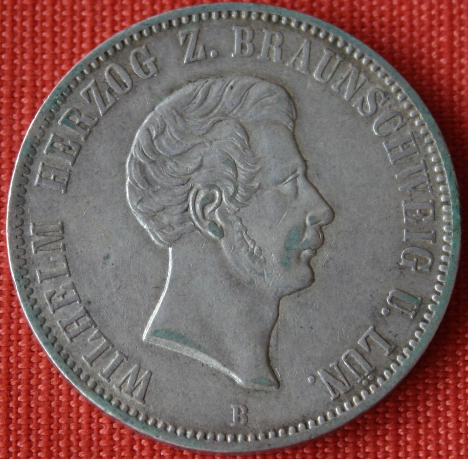 1 Taler aus dem Jahr 1853, Welter 3197